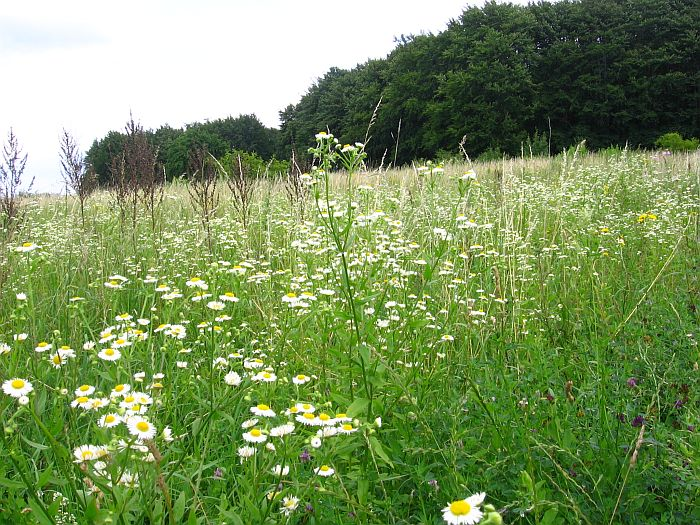 Bukowa Góra w Dąbrowie Górniczej